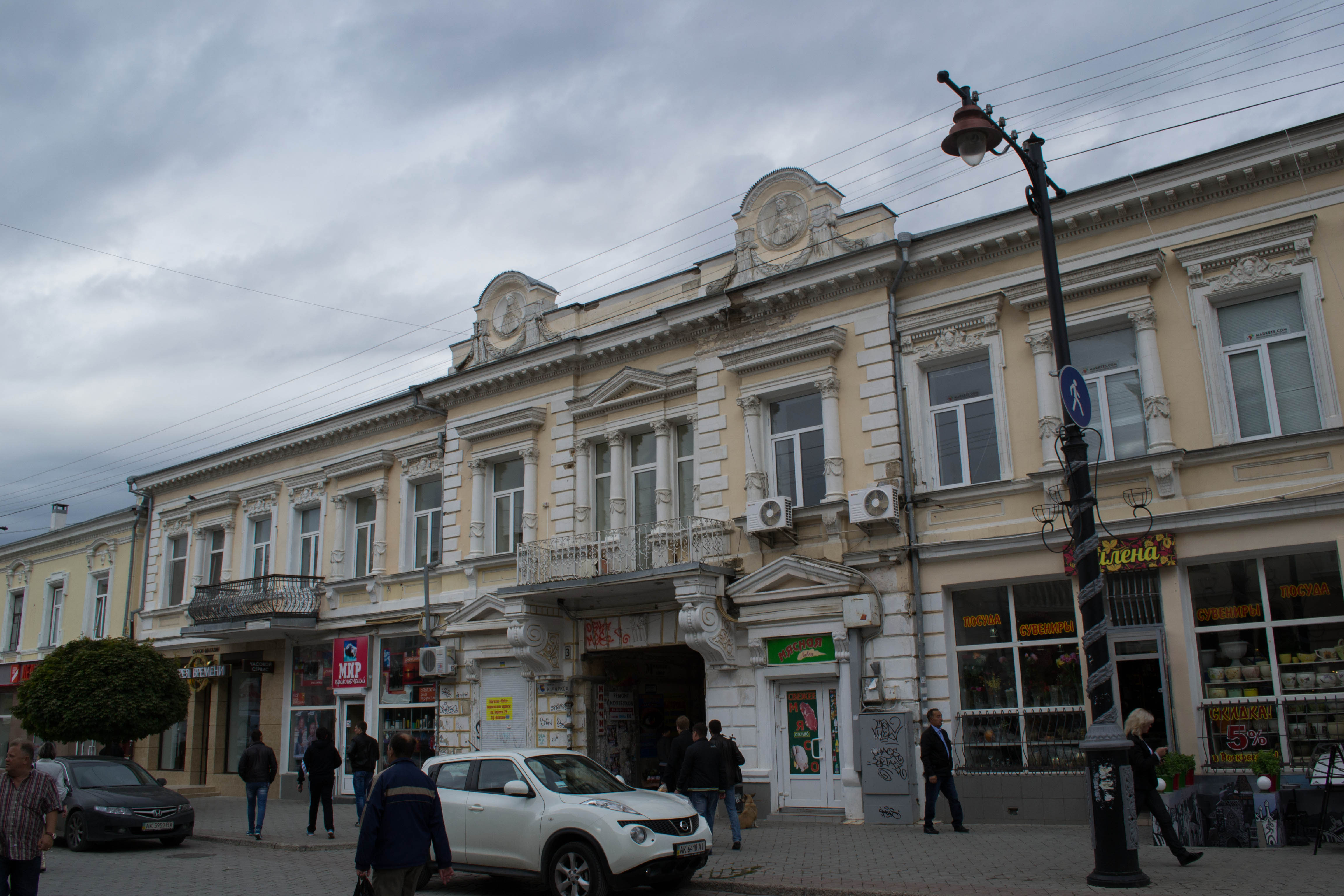 Будинок прибутковий Я. А. Хаджі, Сімферополь, вул. К. Маркса, 3, літер «А»